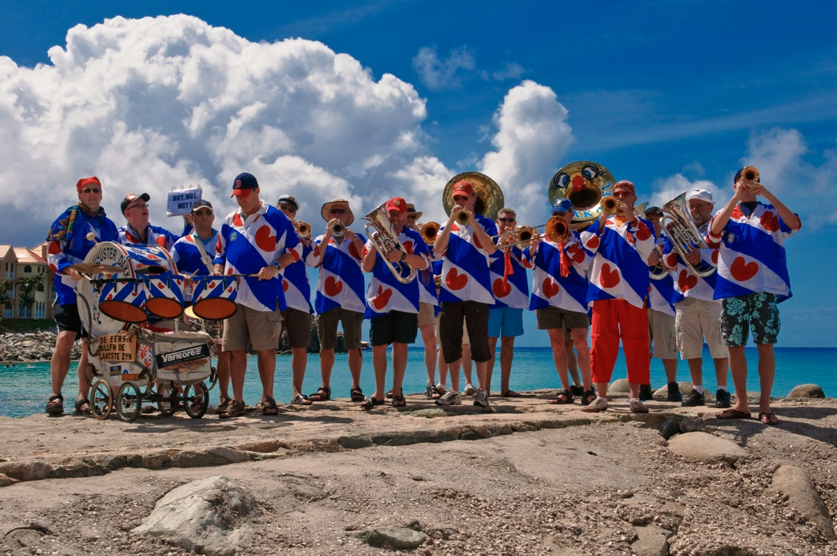 De Blauhúster Dakkapel tijdens de 4e Cariben Tour 2009 (Sint Maarten)